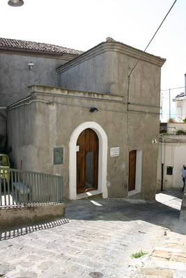 Abitazione del poeta Albino Pierro